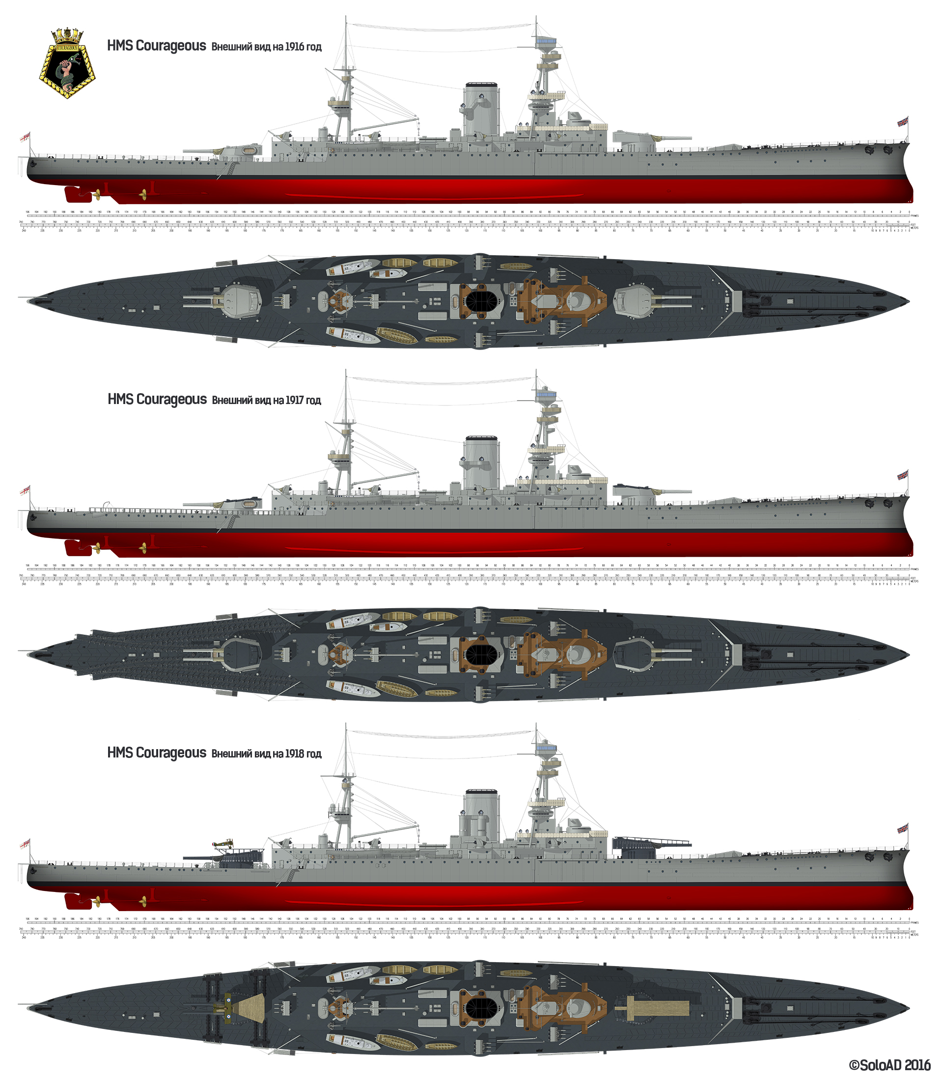 Внешний вид HMS Courageous в первые годы службы